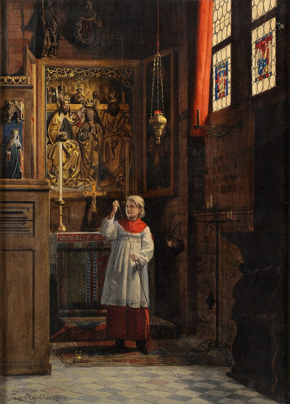 Der Messdiener. Signiert. Datiert 1874. Gouache. 60 x 43 cm